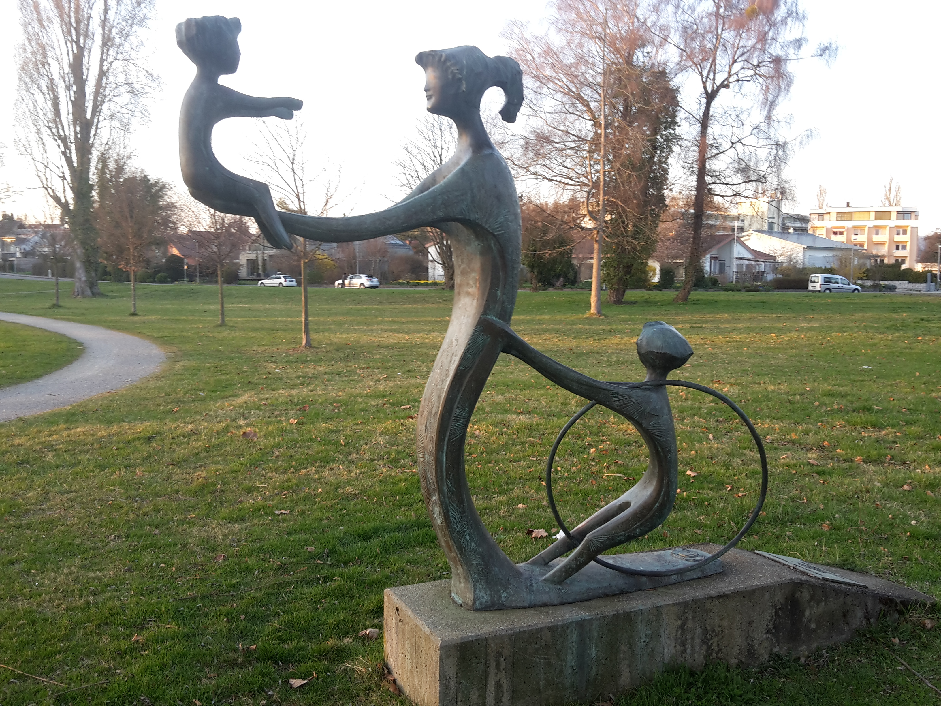 Skulptur von Robert Seyfried "Geborgene Kindheit" durch Zuwendung, Bindung, Selbstbehauptung. Sie befindet sich im Mettnaupark in Radolfzell.